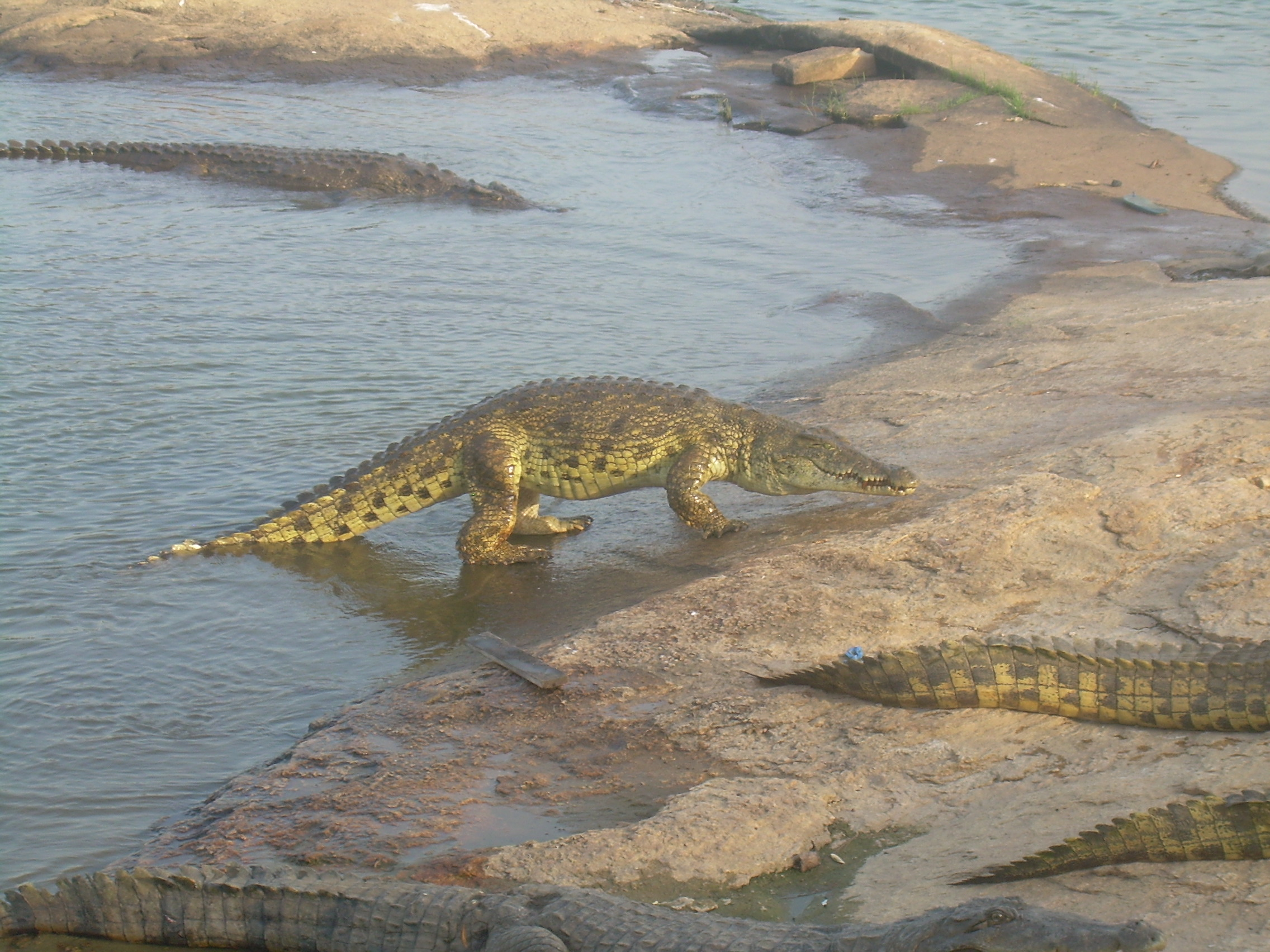 Crocodile sortant de l'eau, à Yamoussoukro, Côte d'Ivoire